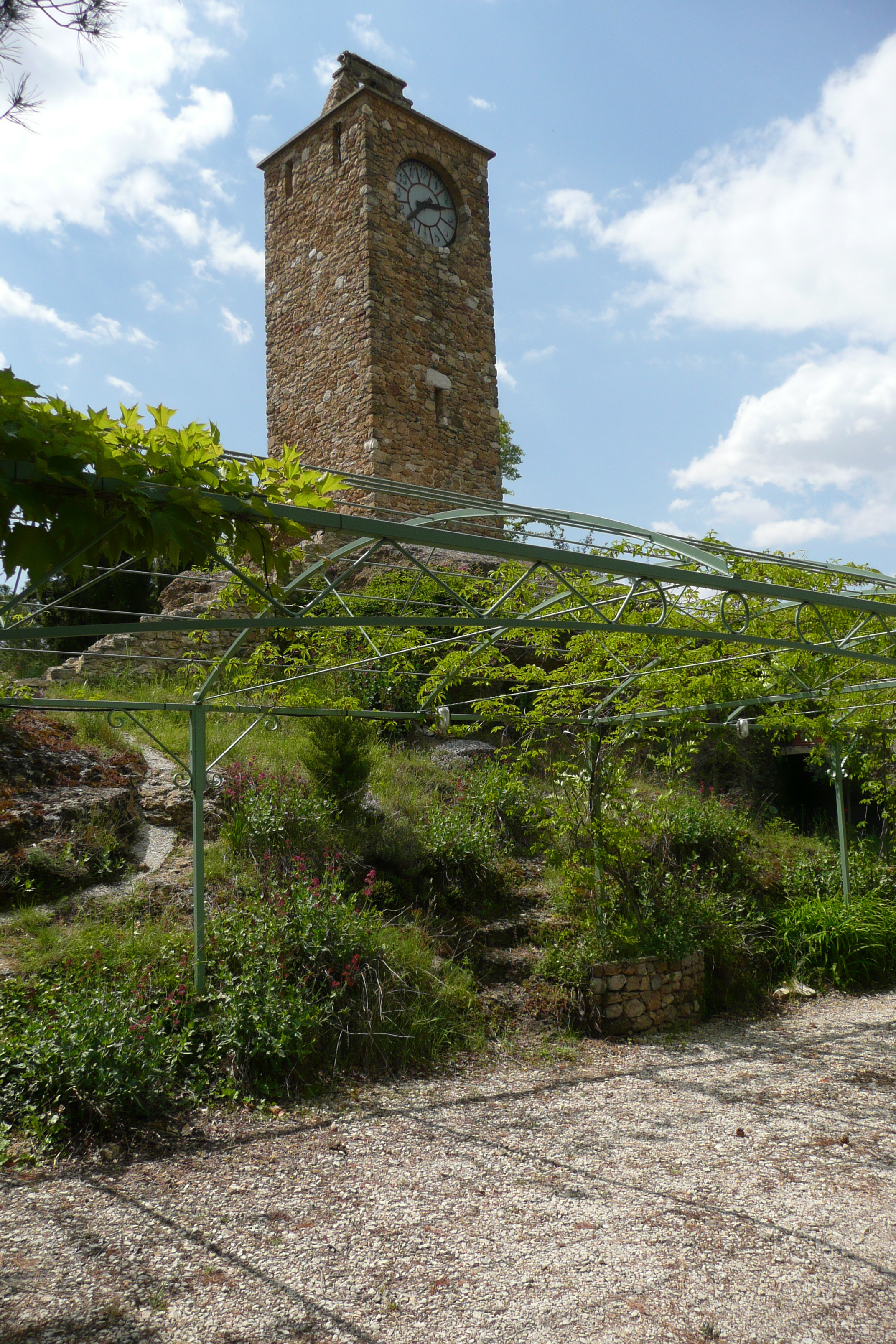 Tour à Puyméras.